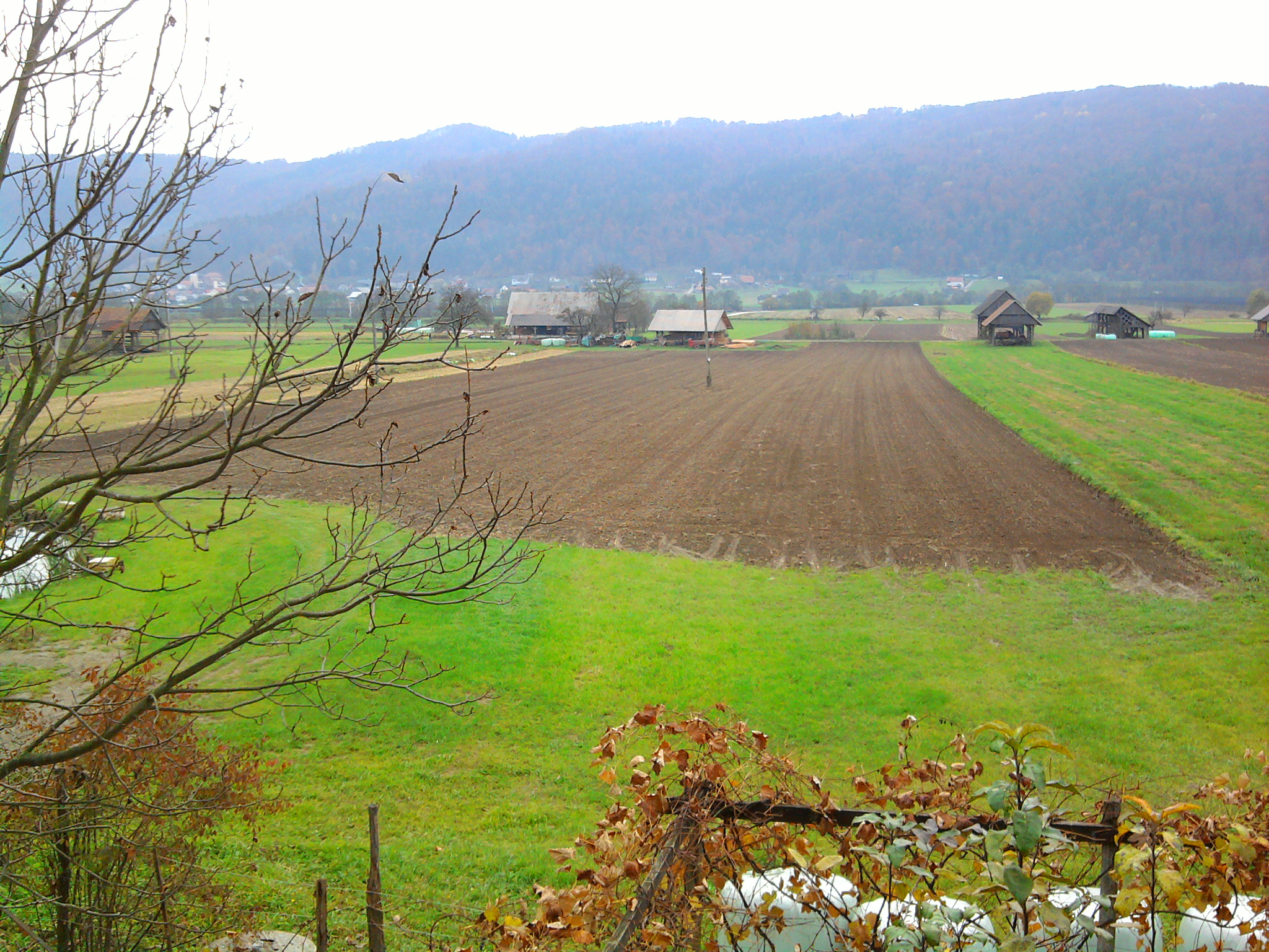 Pogled na polje proti Savi iz hiše v Račici